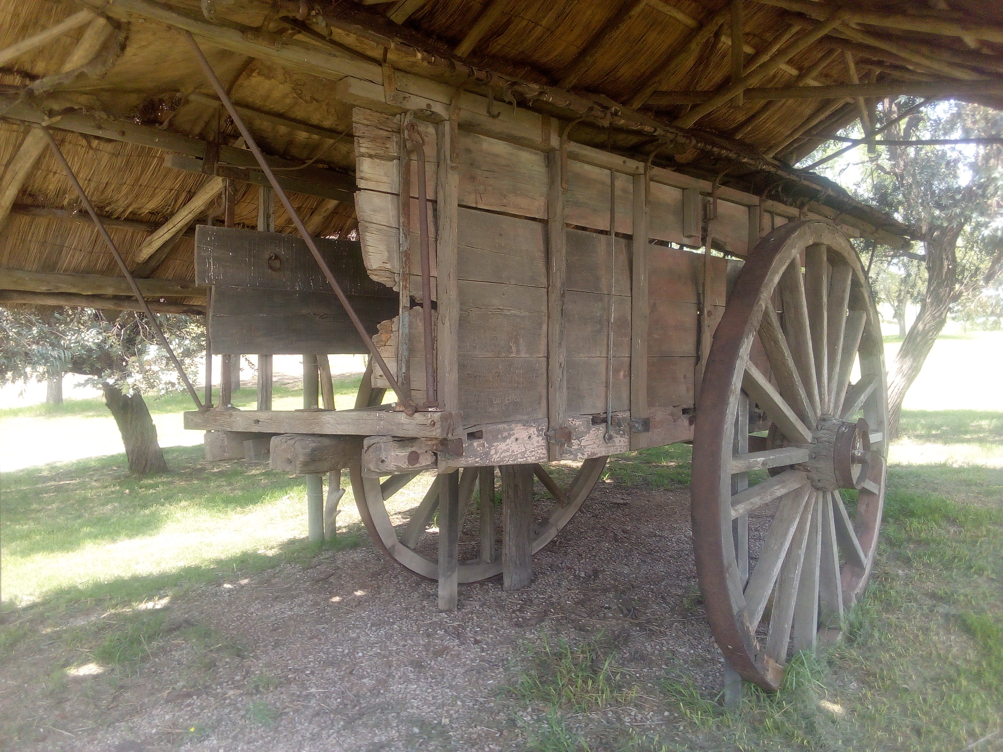 Carreta de los primeros pobladores de 30 de Agosto, Pcia. de Bs. As., Argentina